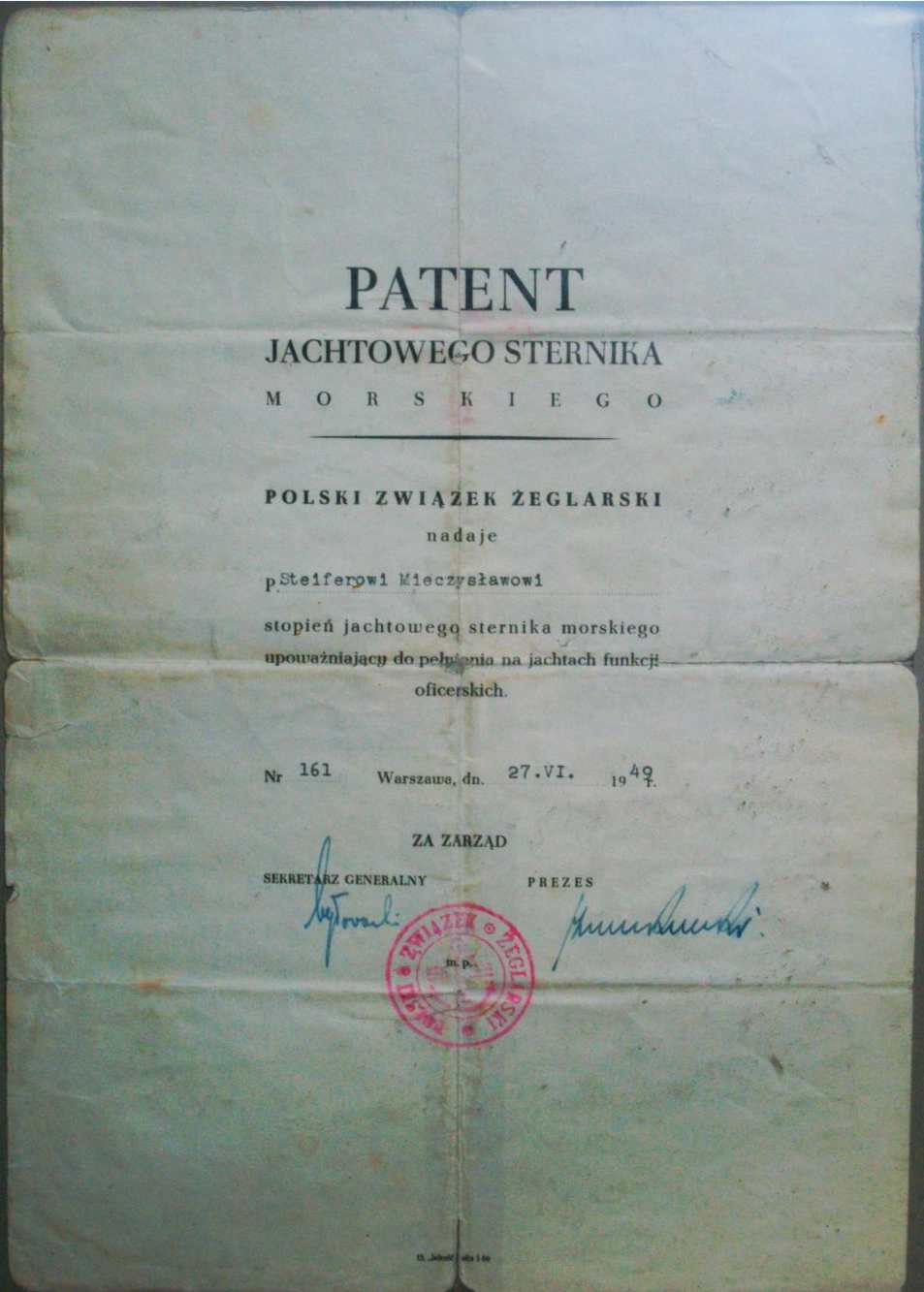 patent jachtowego sternika morskiego, 1949 / yacht helmsman patent, Poland 1949